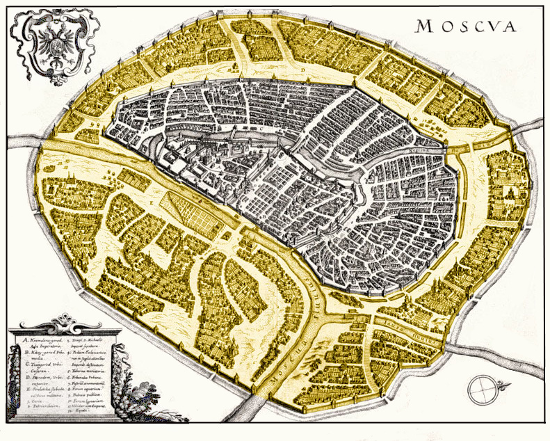 Земляной город (Скородом) показан на плане Москвы Маттеуса Мериана (1638) жёлтым цветом.